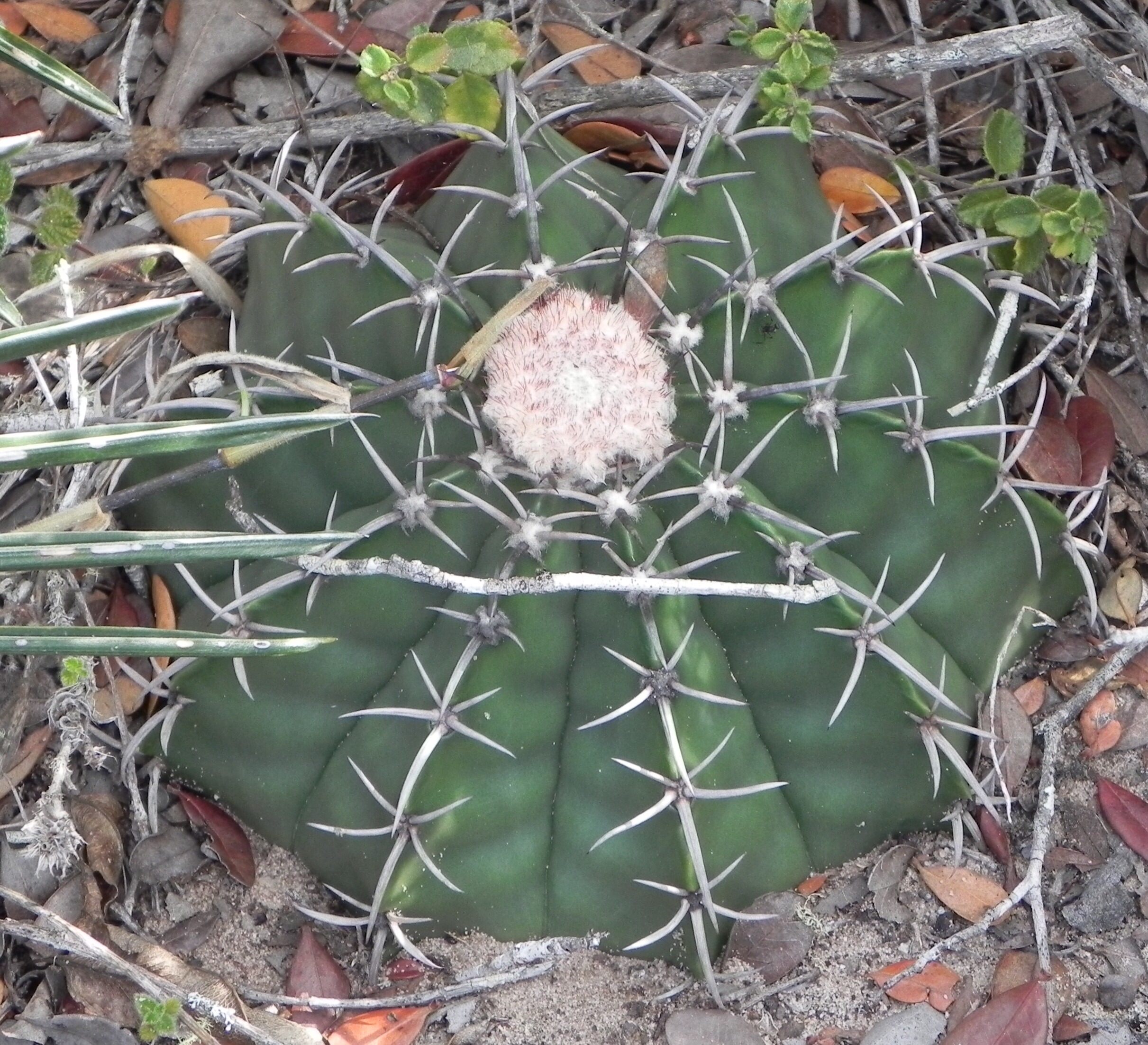 Bahia Brasil